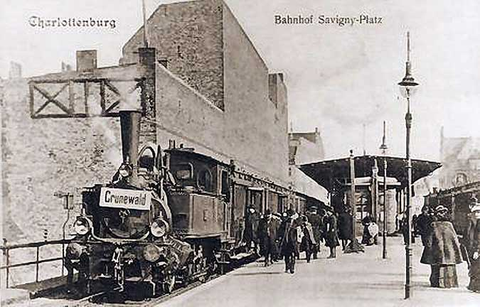 Dampflokomotive im Bahnhof Savignyplatz etwa 1900.